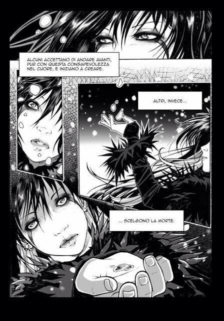 tavola interna interlunium Rigel